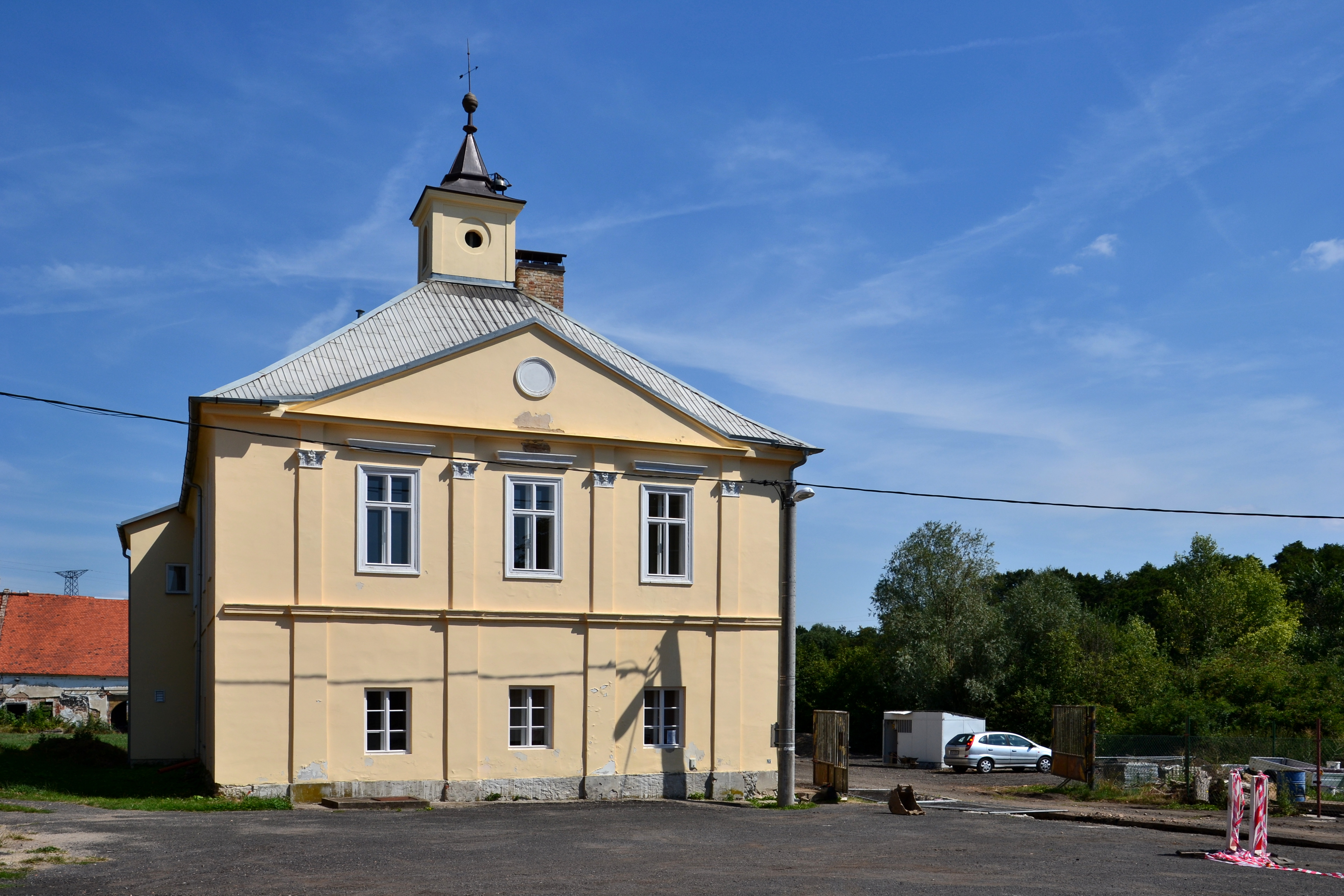 Zámek, z toho jen: budova zámku a pozemek č. 12 Rokle, Rokle 10